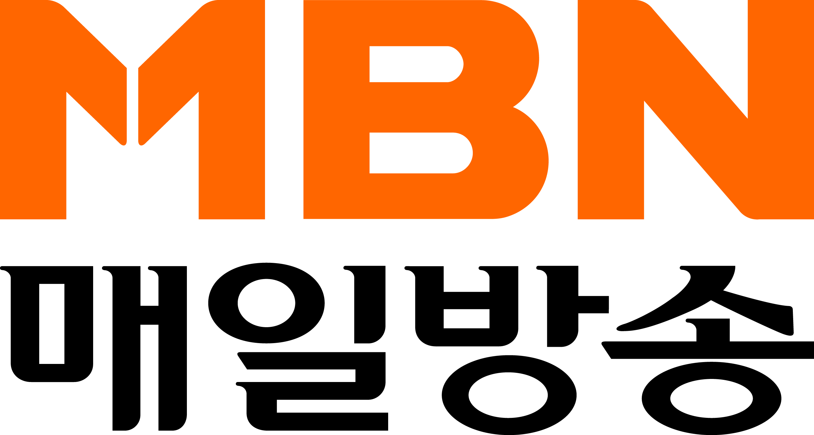 MBN 로고